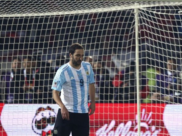 Penal de Gonzalo Higuain